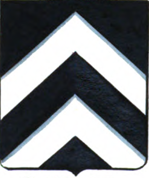 De sable à deux chevrons d'argent.